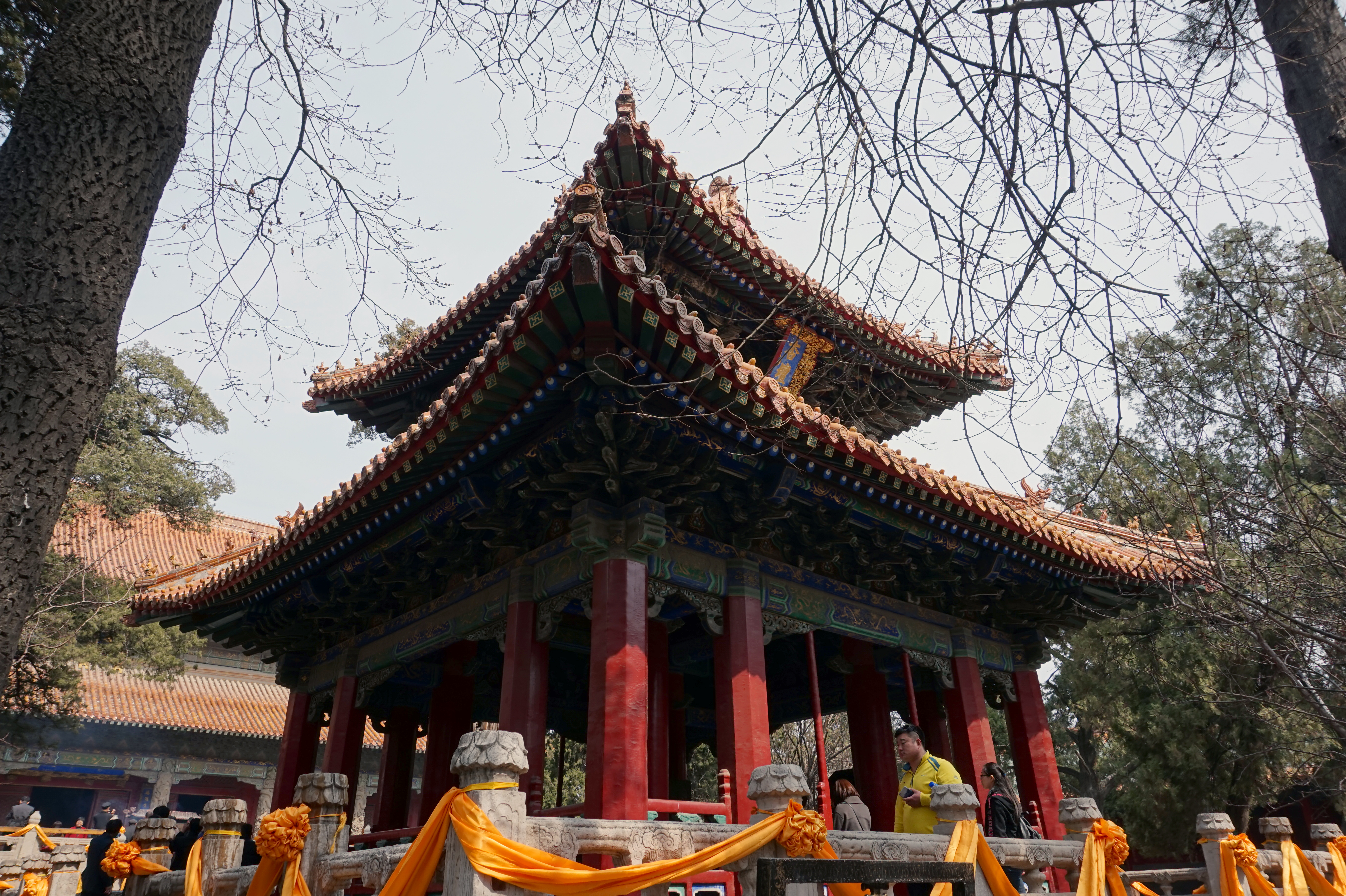 曲阜孔庙杏坛。